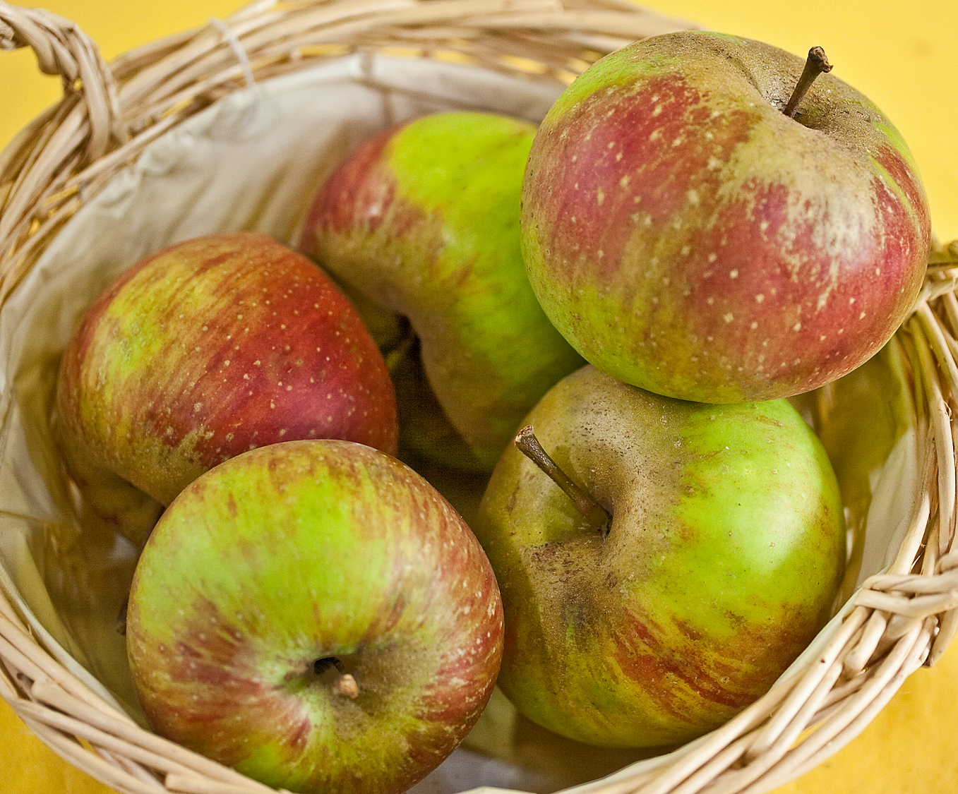 Der Kaiser Wilhelm ist eine Apfelsorte